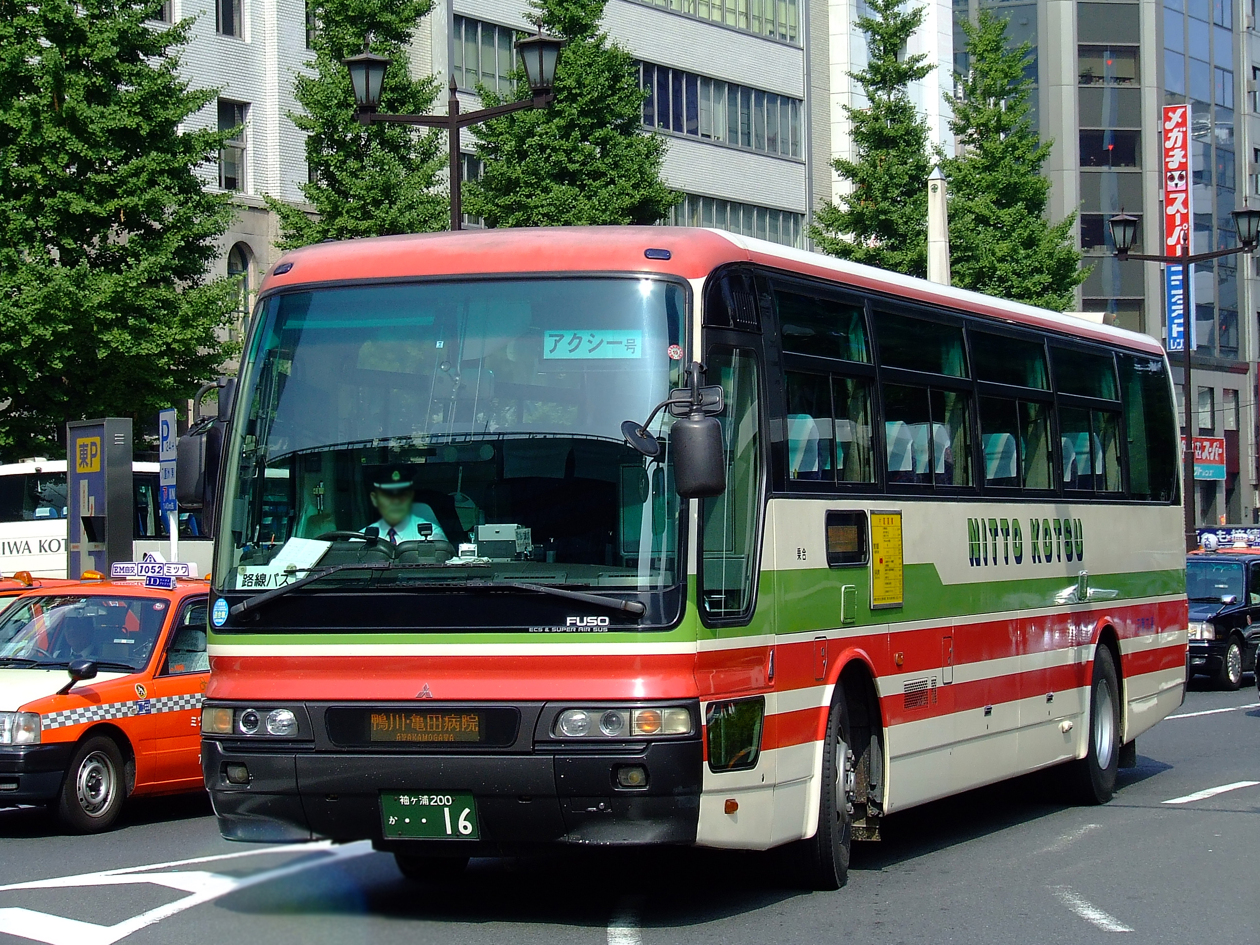 日東交通高速バス「アクシー号」東京駅付近にて